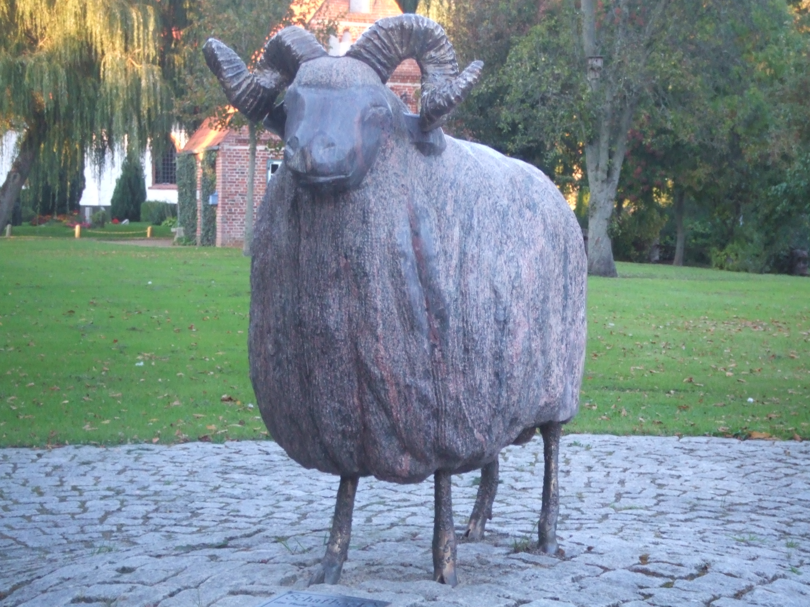 schafbock, plastik aus motamorphit von lothar frieling, 2001, vor der kirche in koldenbüttel, germany